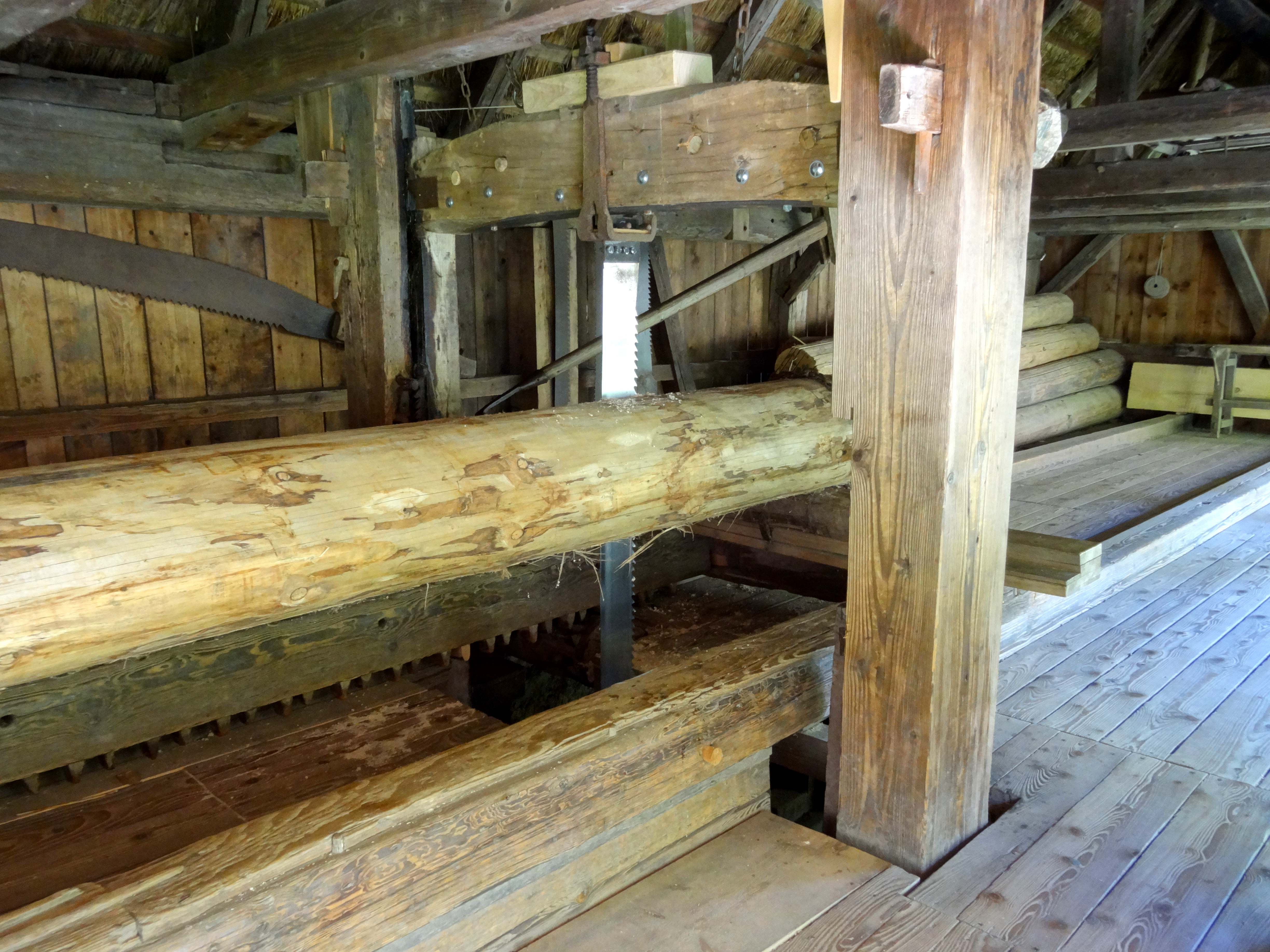 Vogtsbauernhof und Nebengebäude - siehe Bildtitel.